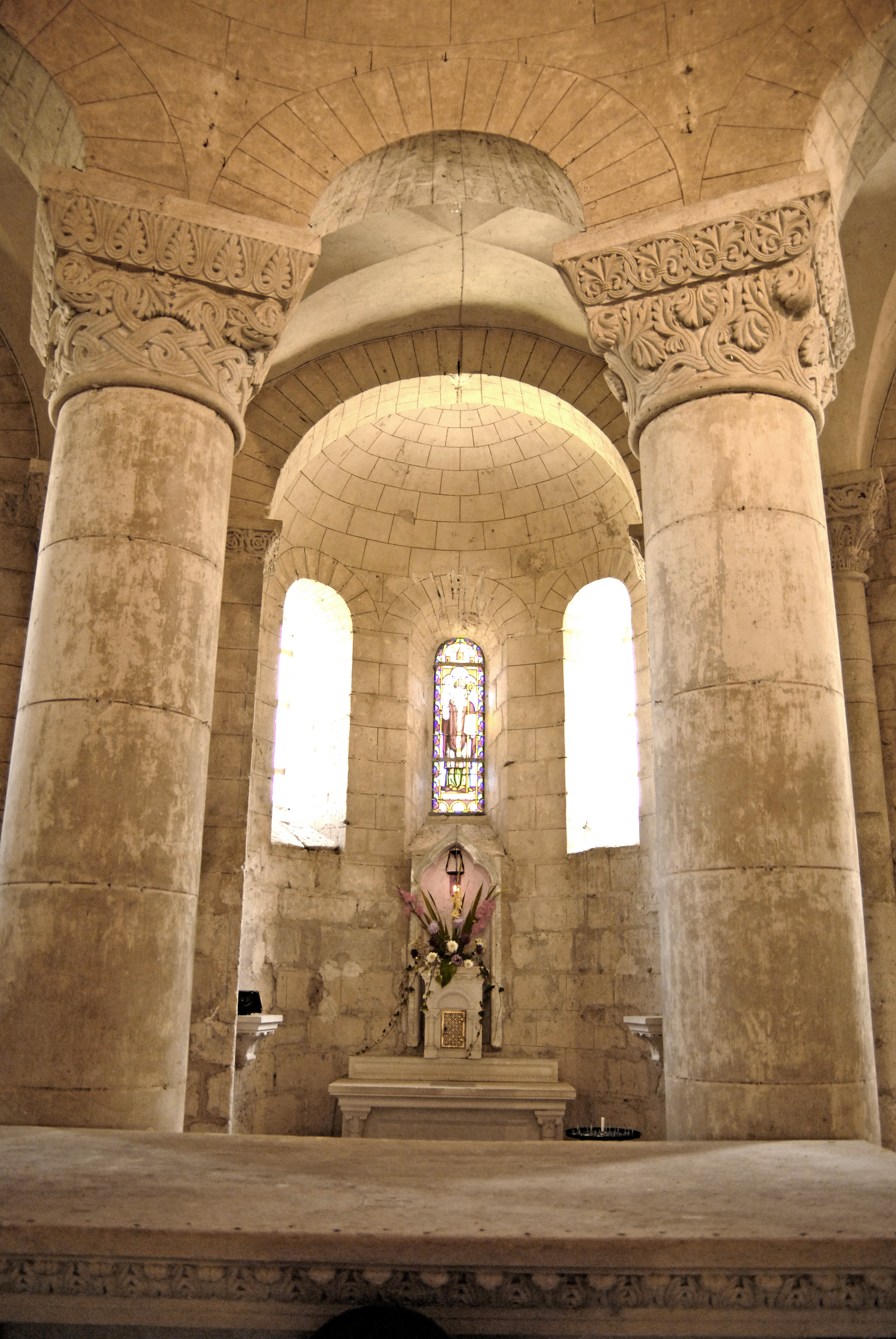 Melle, St.-Hilaire, Umgangskapelle vom Chor aus